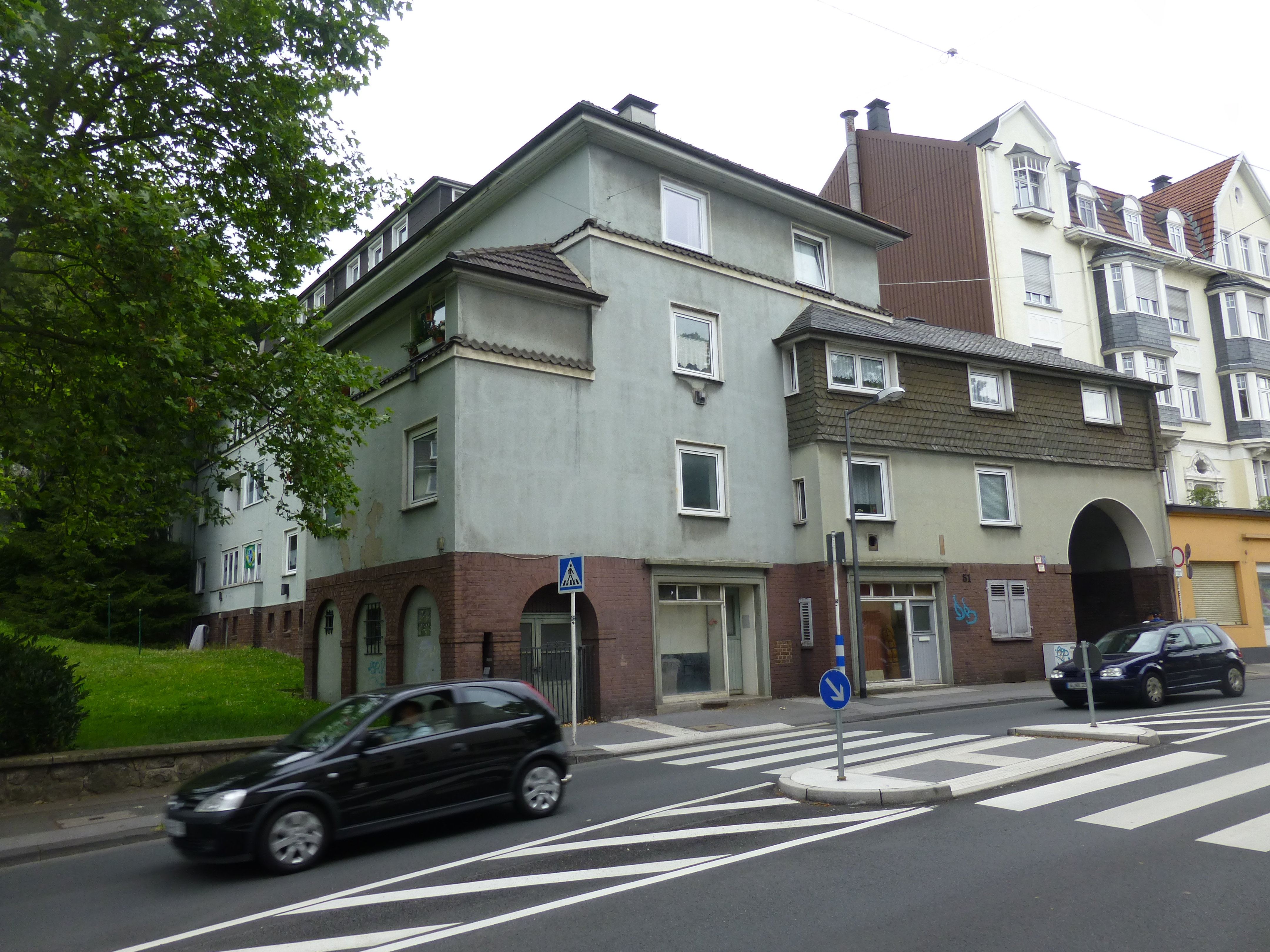 Wuppertal, Klingelholl 51, Kopfbau des östlichen Seitenflügels des um eine hofähnliche Frei- und Grünfläche (Ansatz am linken Bildrand sichtbar) gruppierten Wohnhofs Klingelholl. Der Torbau deckt als "Löf" den schmalen Fahrweg ab, der zu den in den Flügelbauten auf der hofabgewandten Seite liegenden Eingängen führt.